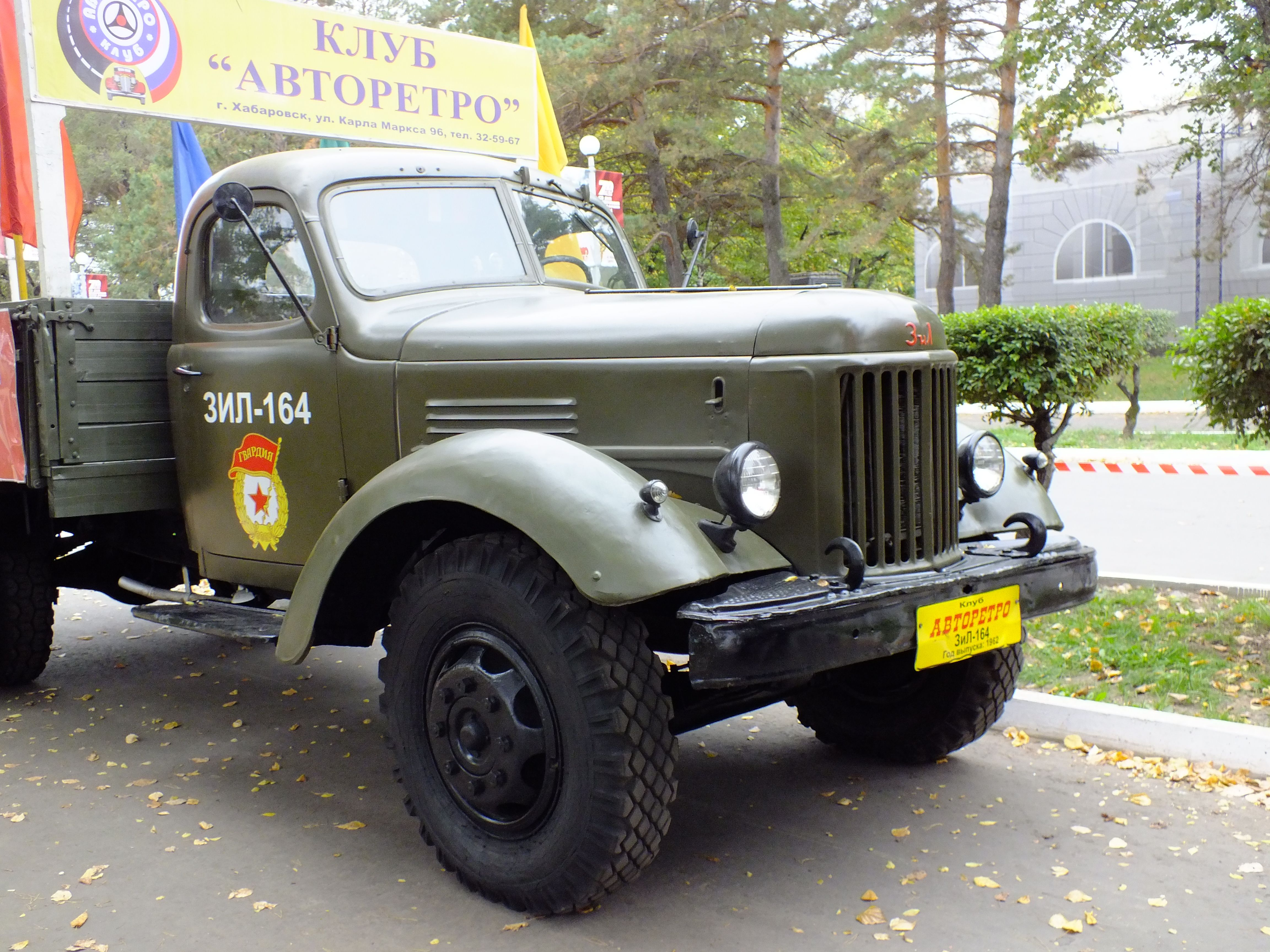 ZiL-164